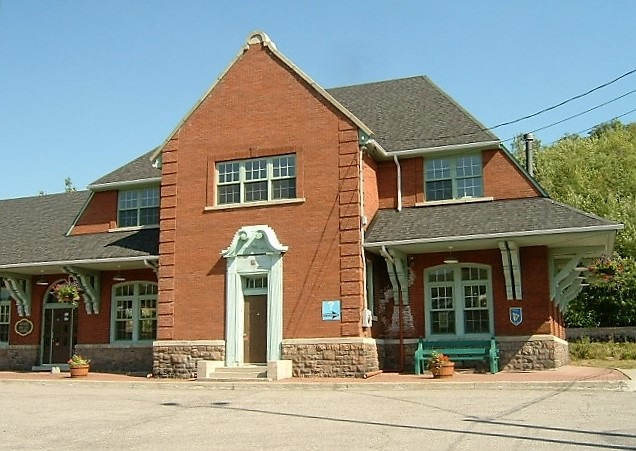 Gare de Témiscaming constuite en 1927. Elle a été reconnue monument historique en 1979.